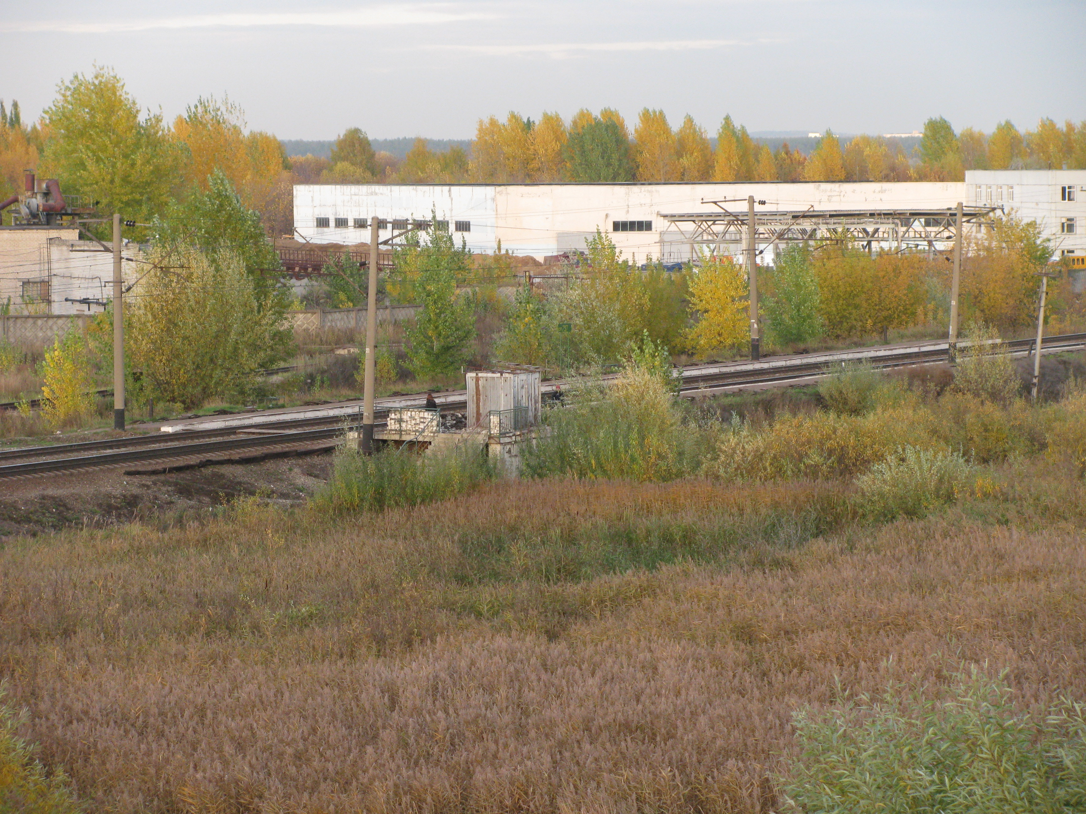 Платформа